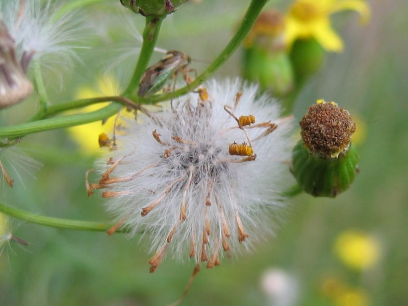 Schmalblättriges Greiskraut Senecio inaequidens, Rostock